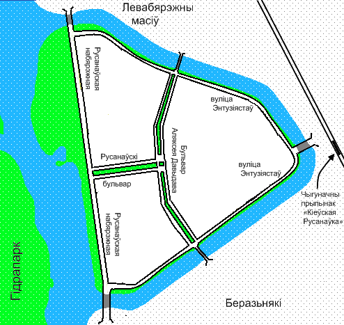 Беларуская (тарашкевіца): Схема Русанаўкі (Кіеў)